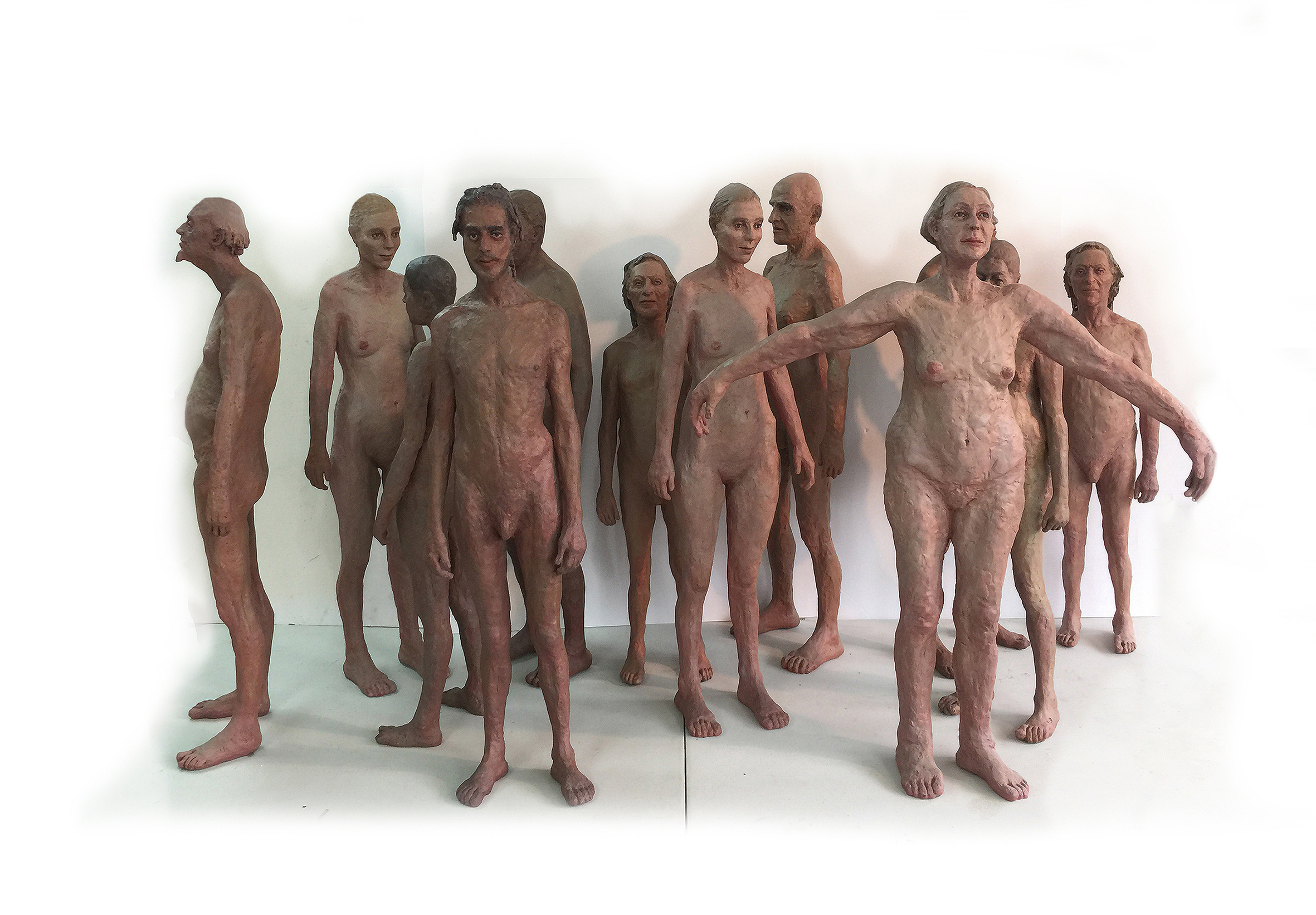 קבוצת פסלי אלומיניום צבועים, גובה 70-80 ס"מ, 2010 –2012